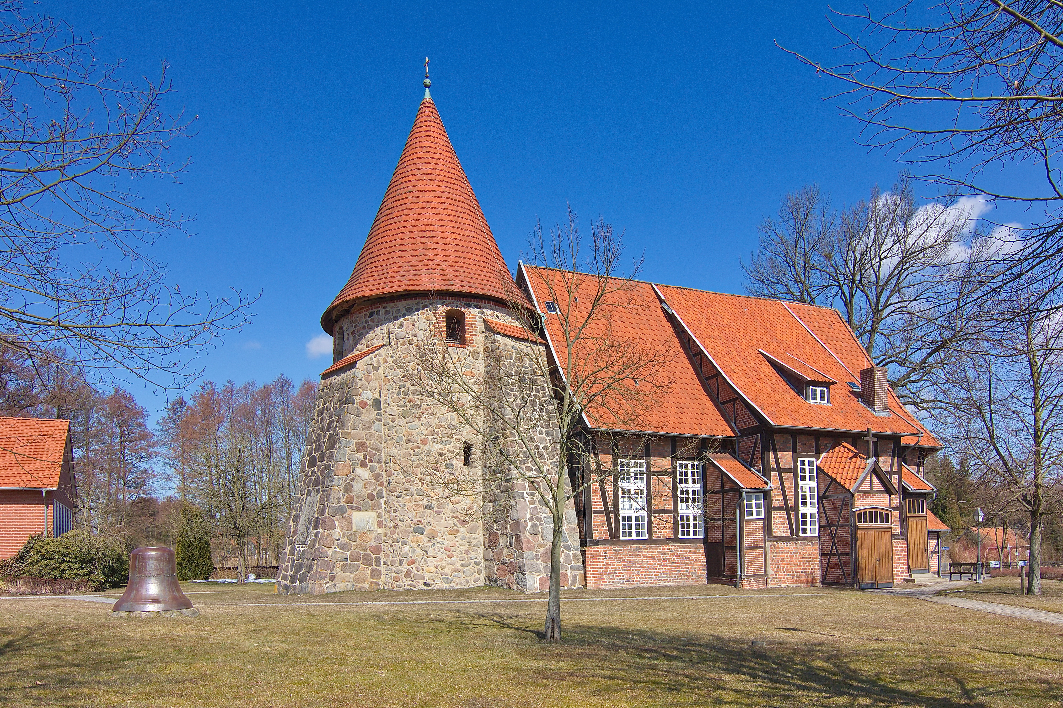 St.-Remigius-Kirche in Suderburg, Niedersachsen, Deutschland. Der Turm datiert aus der Umnutzung einer um 1000 n.Chr. errichteten Burg.